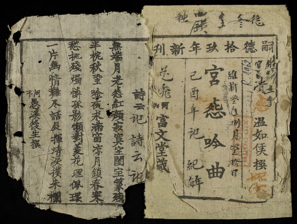 “Cung oán là một trong ba khúc ngâm quốc âm nổi tiếng trong văn học cổ điển Việt Nam. Sáng tác theo thể song thất lục bát. Cung oán ngâm khúc diễn tả tâm trạng của người cung nữ vốn nổi danh tài sắc: 'Chìm đáy nước cá lờ đờ lặn, Lặng lưng trời nhạn ngẩn ngơ sa.' Số phận run rủi, nàng được tiến vào nội cung hầu vua, nhất thời được chiều chuộng, vinh hoa phú quý hết mực. Nào ngờ tình ái của nhà vua ngày một nhạt nhẽo, bị bỏ quên cùng với thời gian, nàng phải sống lạnh lẽo cô đơn trong cung cấm: 'Cung quế duyên phai chầy bóng thỏ, Phòng tiêu thức thắm ngắm xe hươu!'” (Thọ, p. 81).